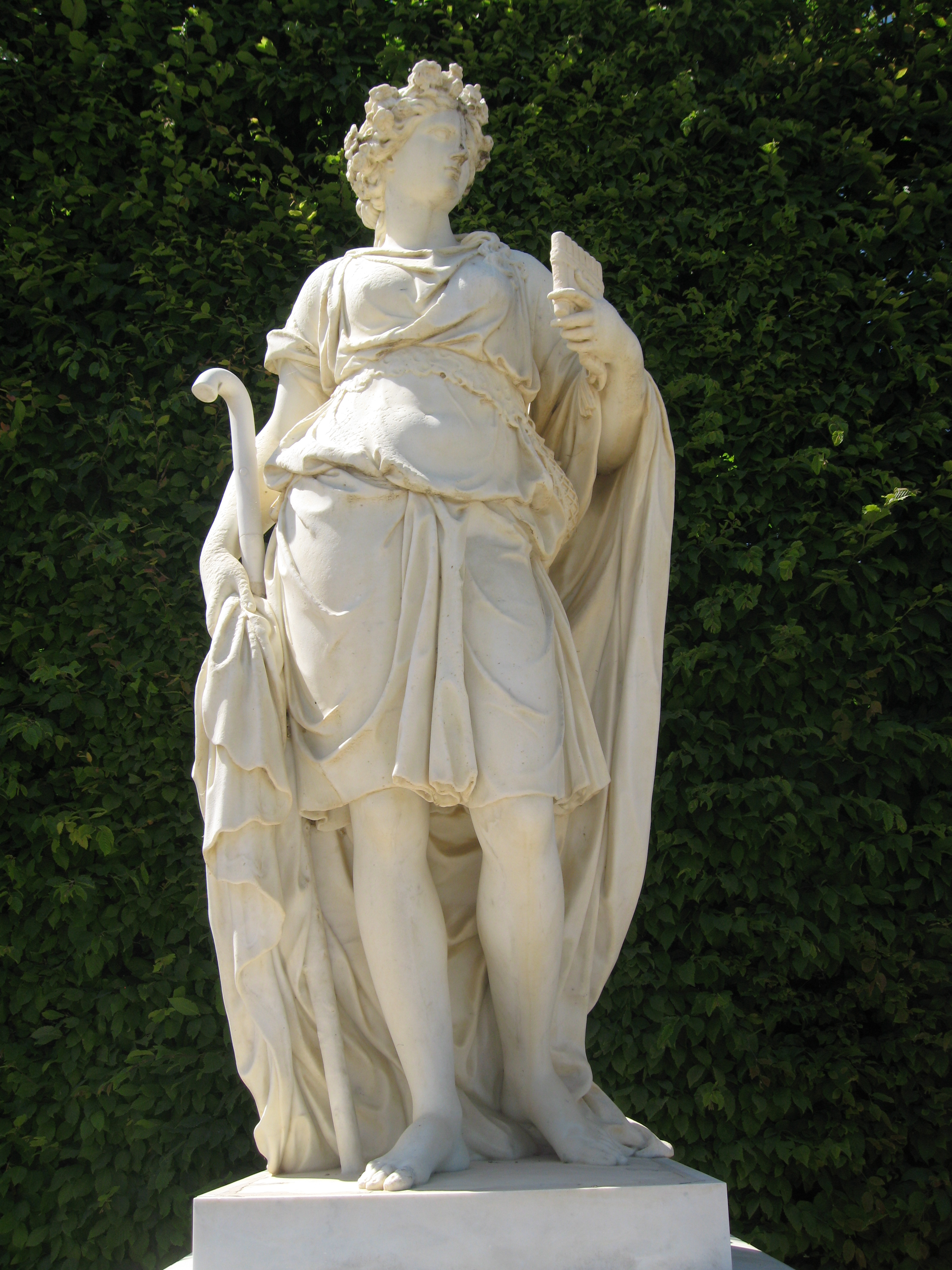 Le poème pastoral, par Hérard et Granier